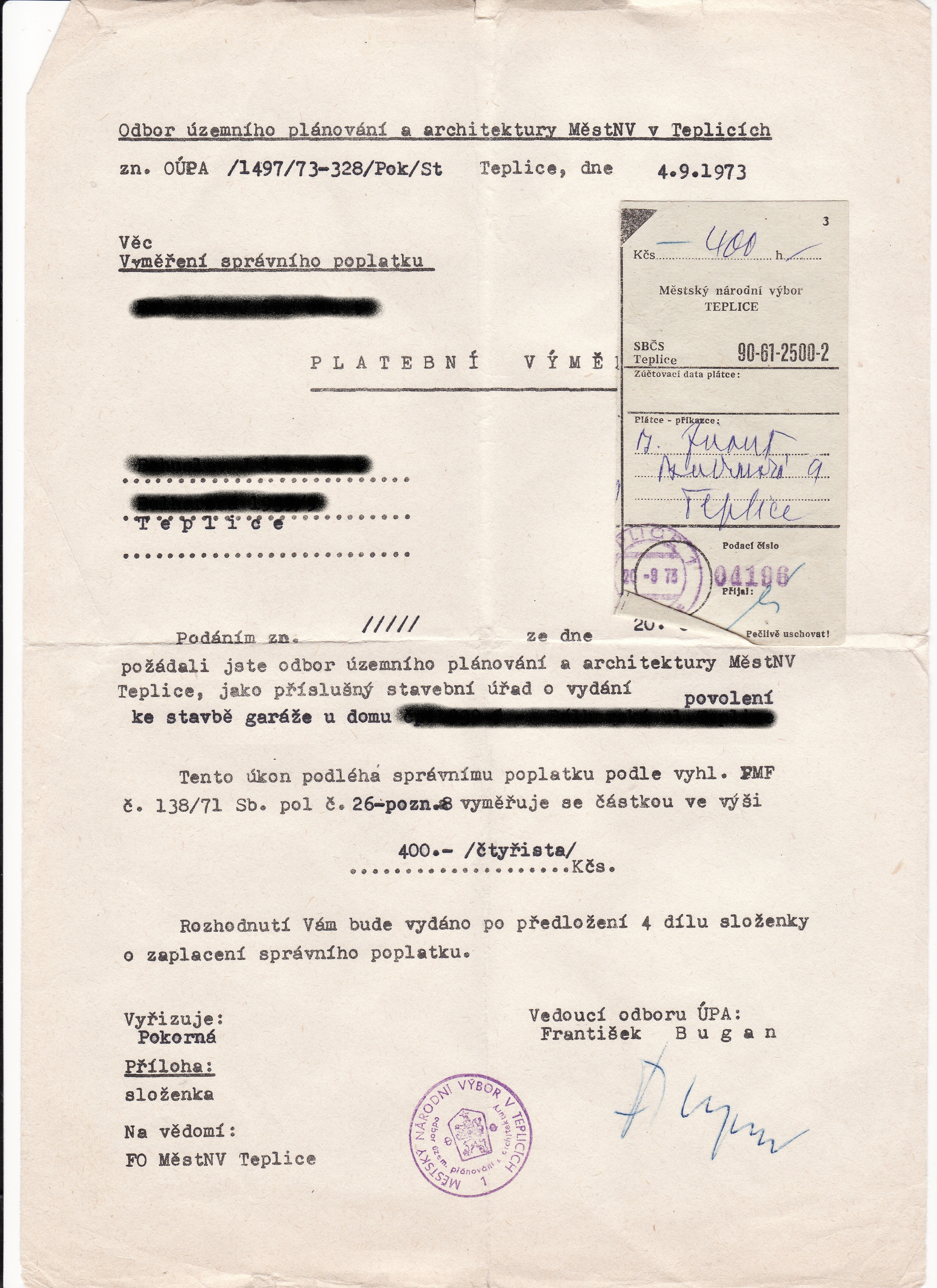 Poplatek 400 Kčs za vyřízení povolení ke stavbě garáže z roku 1973.